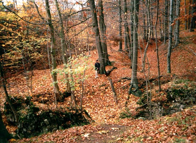 Überreste der Burg Erichsberg in der Gemarkung Gernrode nahe Friedrichsbrunn